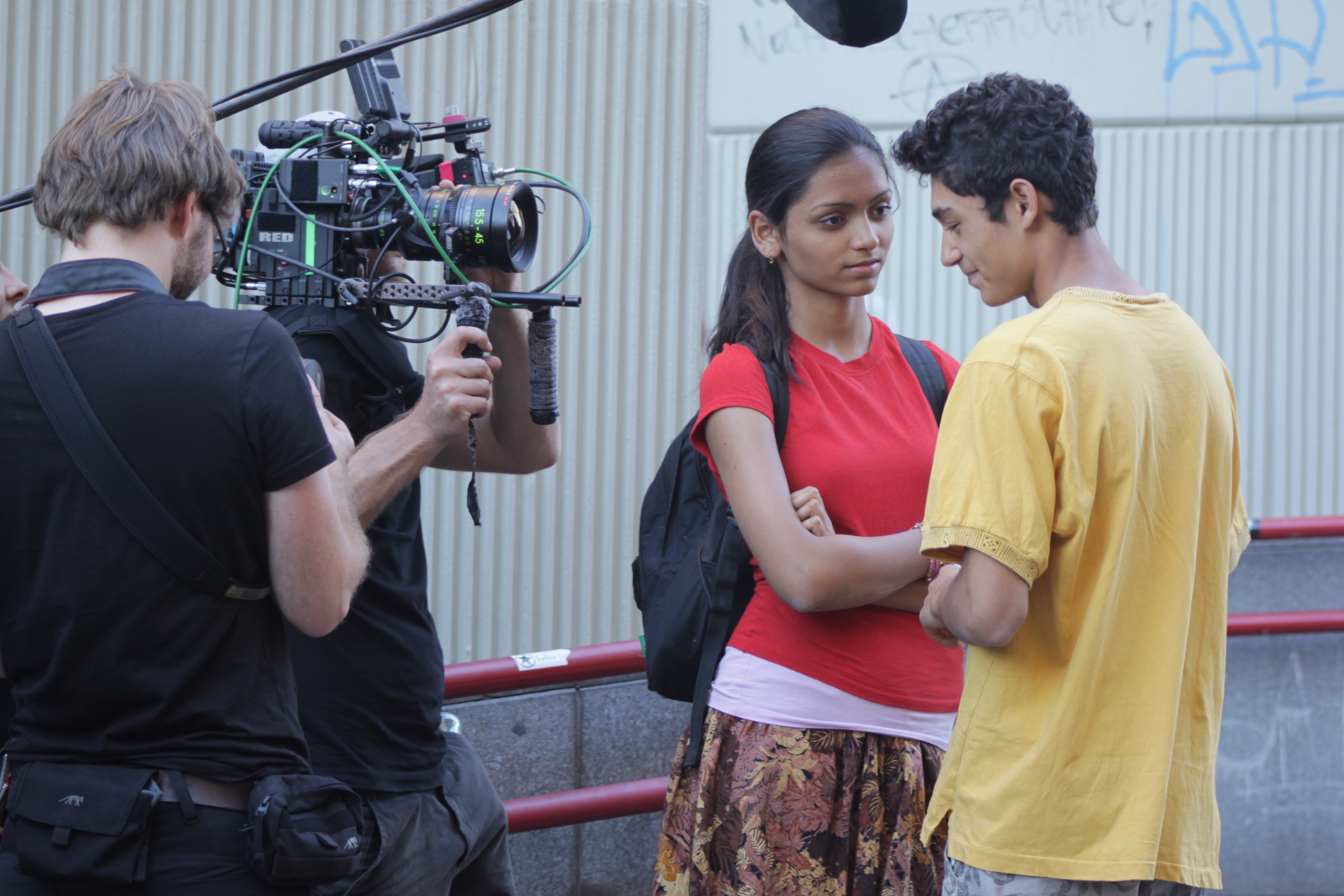 Setfoto